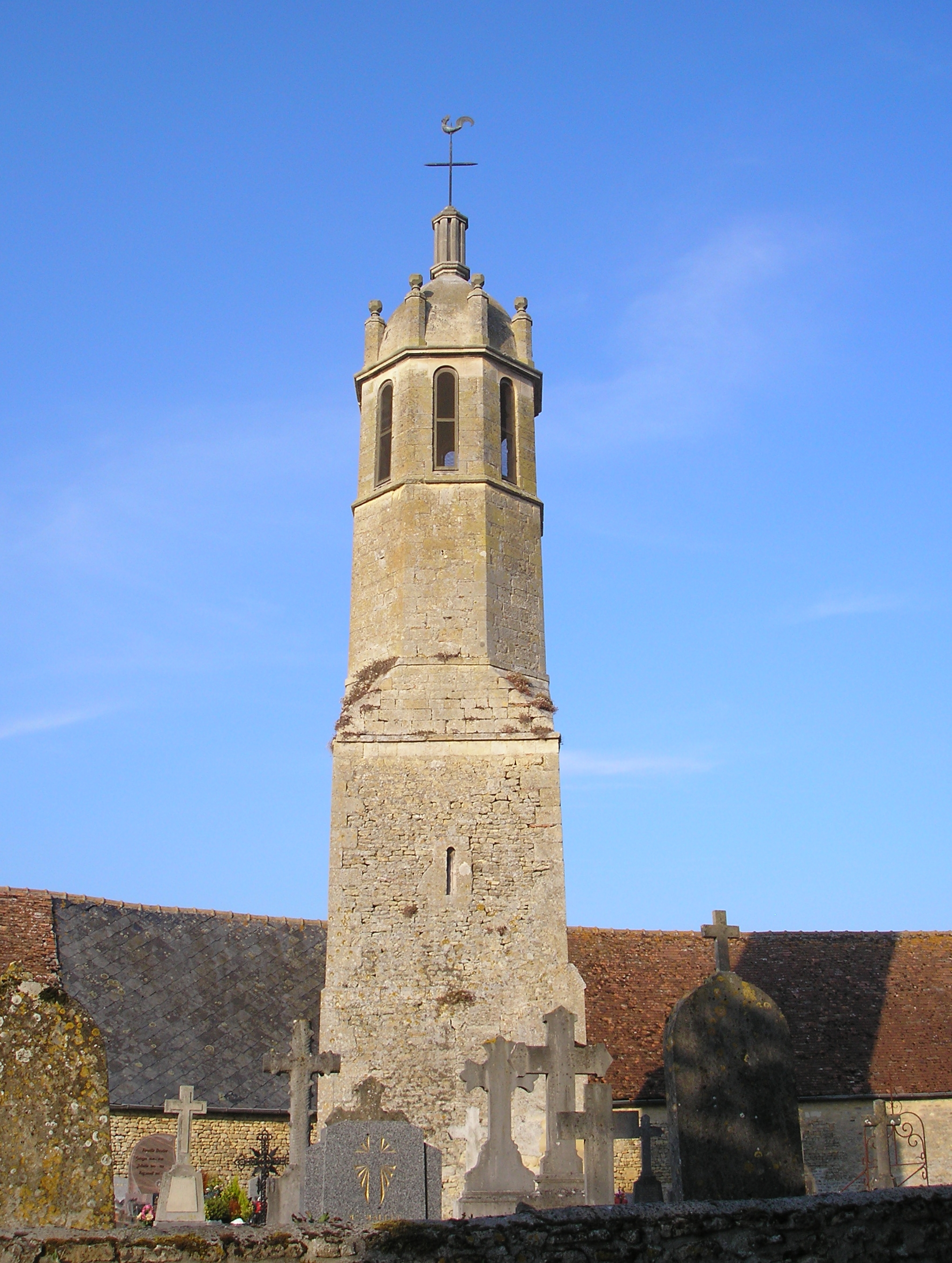 Magny-la-Campagne (Normandie, France). Clocher de l'ancienne église de la Sainte-Vierge.